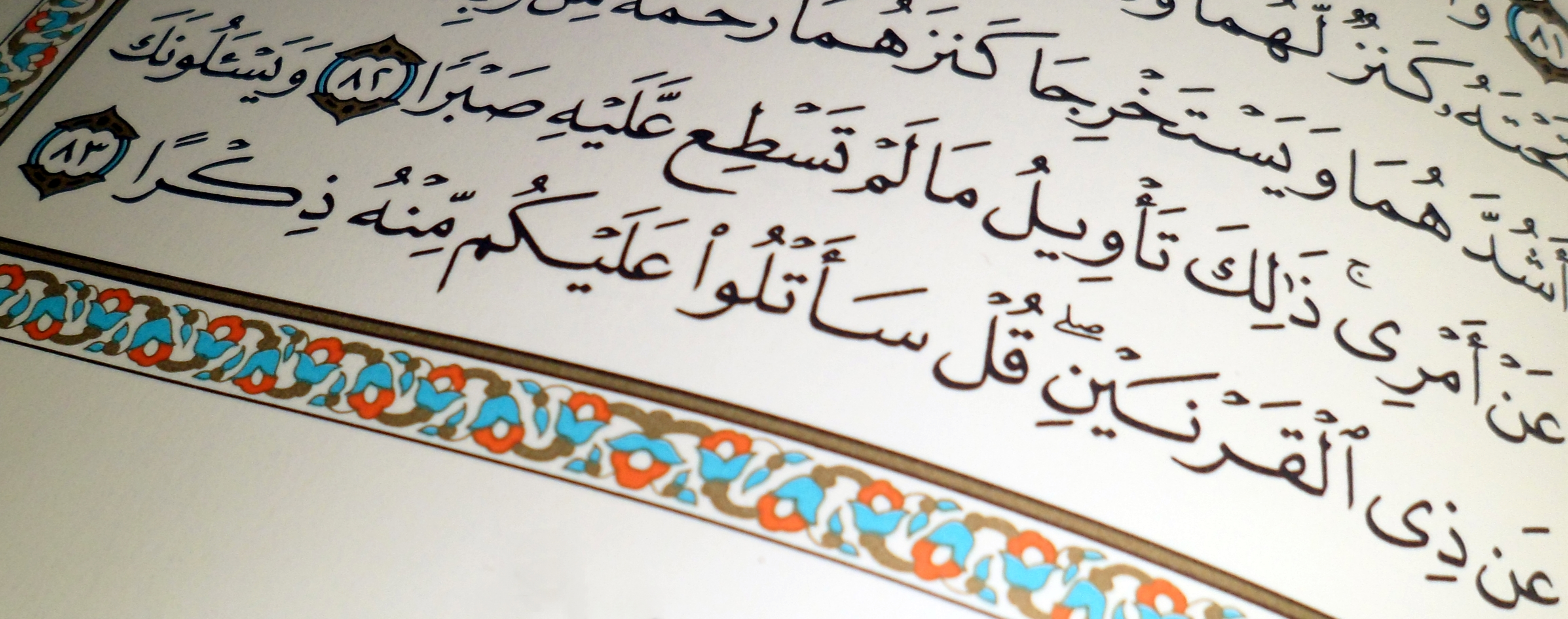 الآية 83 من سورة الكهف